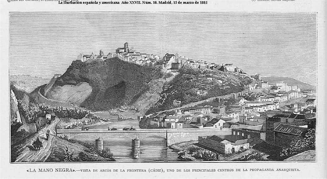 Vista de Arcos de la Frontera (Cadiz) , unos de los principales centros de la propaganda anarquista.